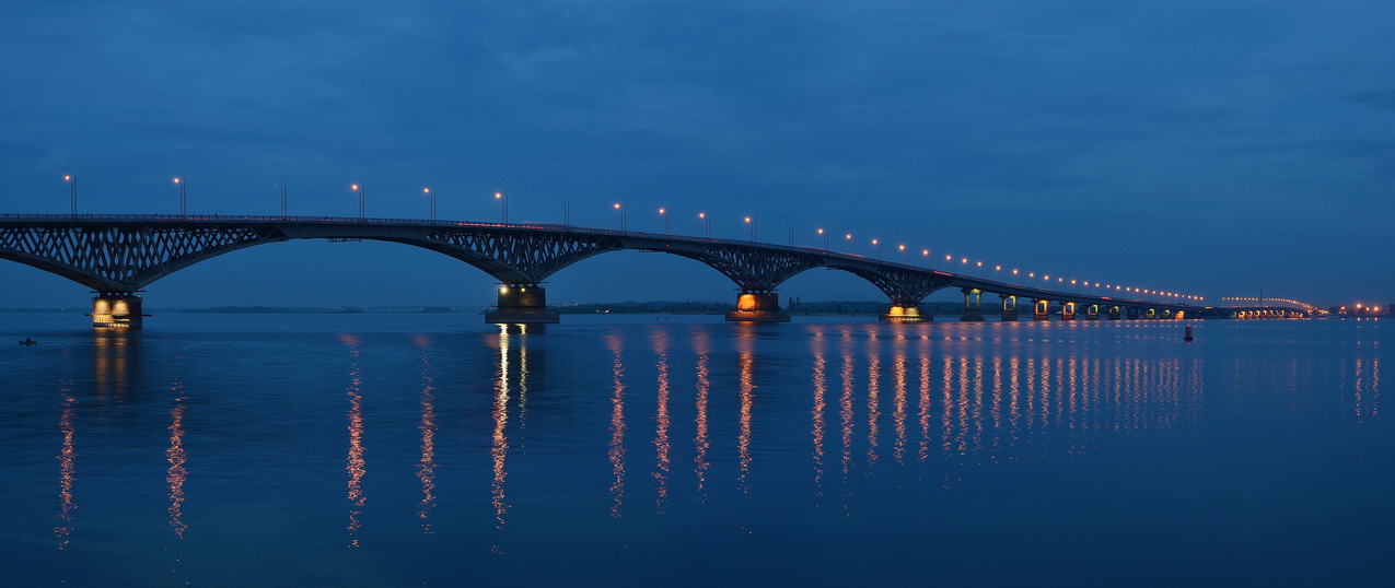 Саратовский мост через Волгу соединяет 2 города - Саратов и Энгельс. Длина моста около 3 км, построен в 1965г. В то время он был самым длинным мостом в Европе.